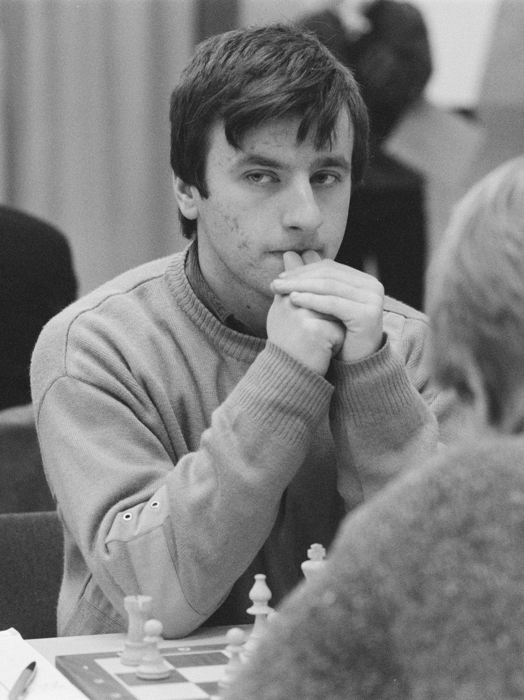 Hoogovensschaaktoernooi 1988; Bulgaar Kiril Georgiev.